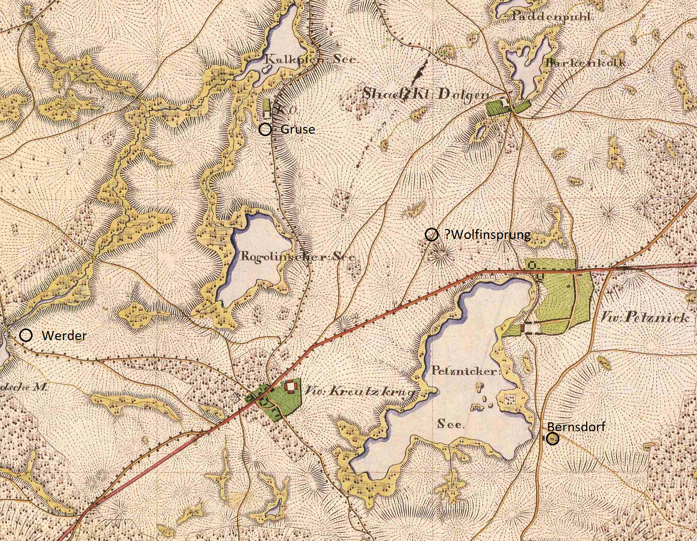 Petznick und Kreuzkrug, Ortsteile der Stadt Templin, Lkr. Uckermark, Brandenburg sowie die kleineren Vorwerke Bernsdorf, Gruse, Werder, Kalkofen, Klein Dolgen und Wolfinsprung (alle abgegangen) auf dem Urmesstischblatt 2847 Templin 1825 bzw. Lagen rekonstruiert nach den Angaben im Historischen Ortslexikon